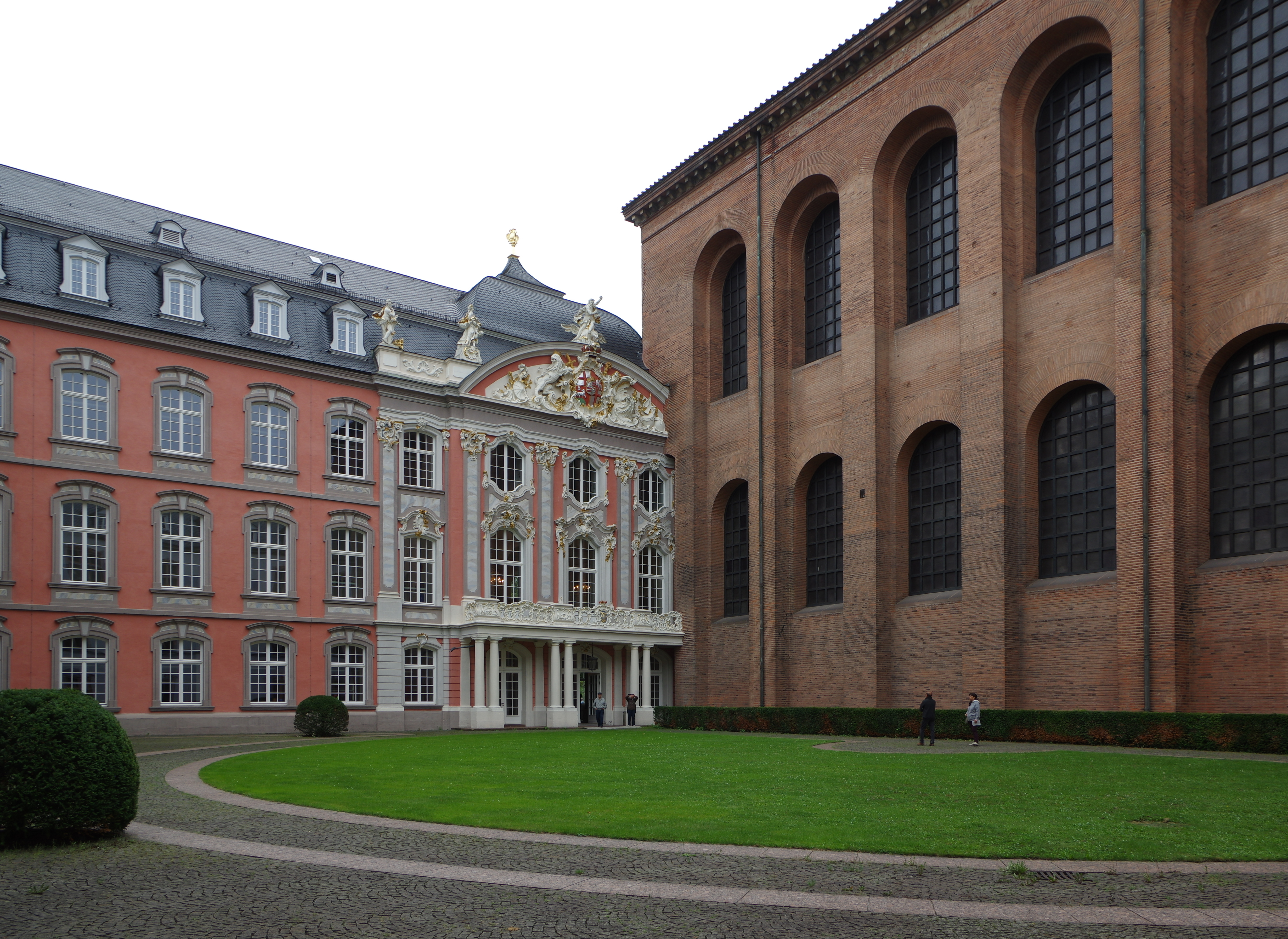 Denkmalzone ehemaliges kurfürstliches Schloss, Neubau des Rokokoschlosses durch Hofarchitekt Johannes Seiz: dreigeschossiger, 22-achsiger Gartenflügel mit Haupt- und Eckpavillon, 1757–61, Fassadenschmuck und Haupttreppenhausskulpturen von Ferdinand Tietz